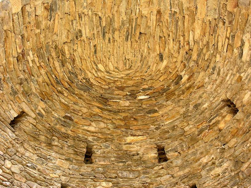 Volta del presbiteri de l'església del monestir de Santa Maria de Roses (Roses, Alt Empordà)